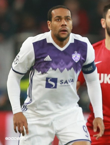 Marcos Tavares